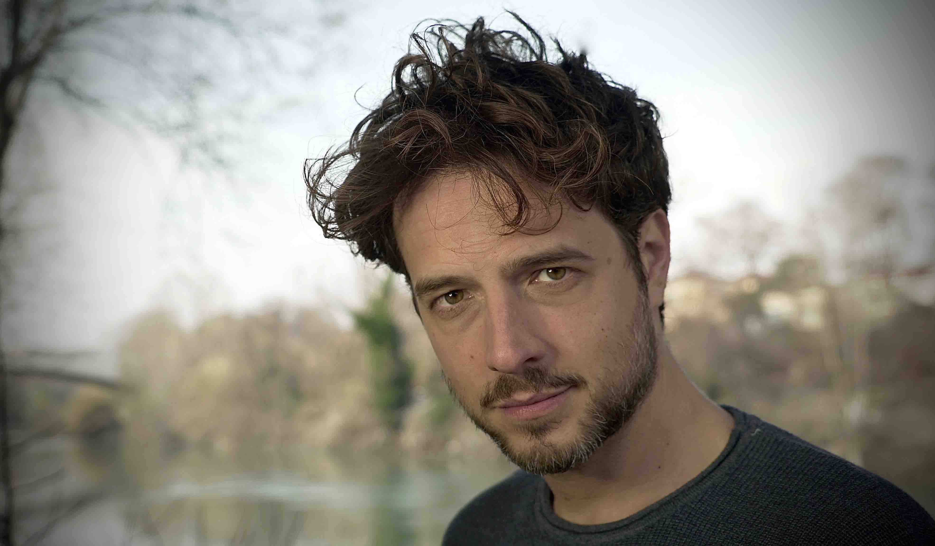 Michele Cesari per il suo debutto nel Paradiso delle Signore Daily